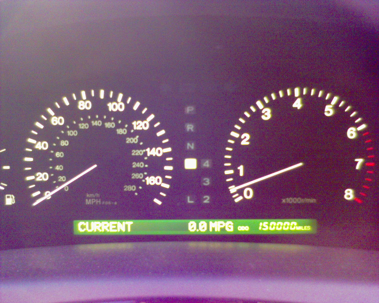 LS 400